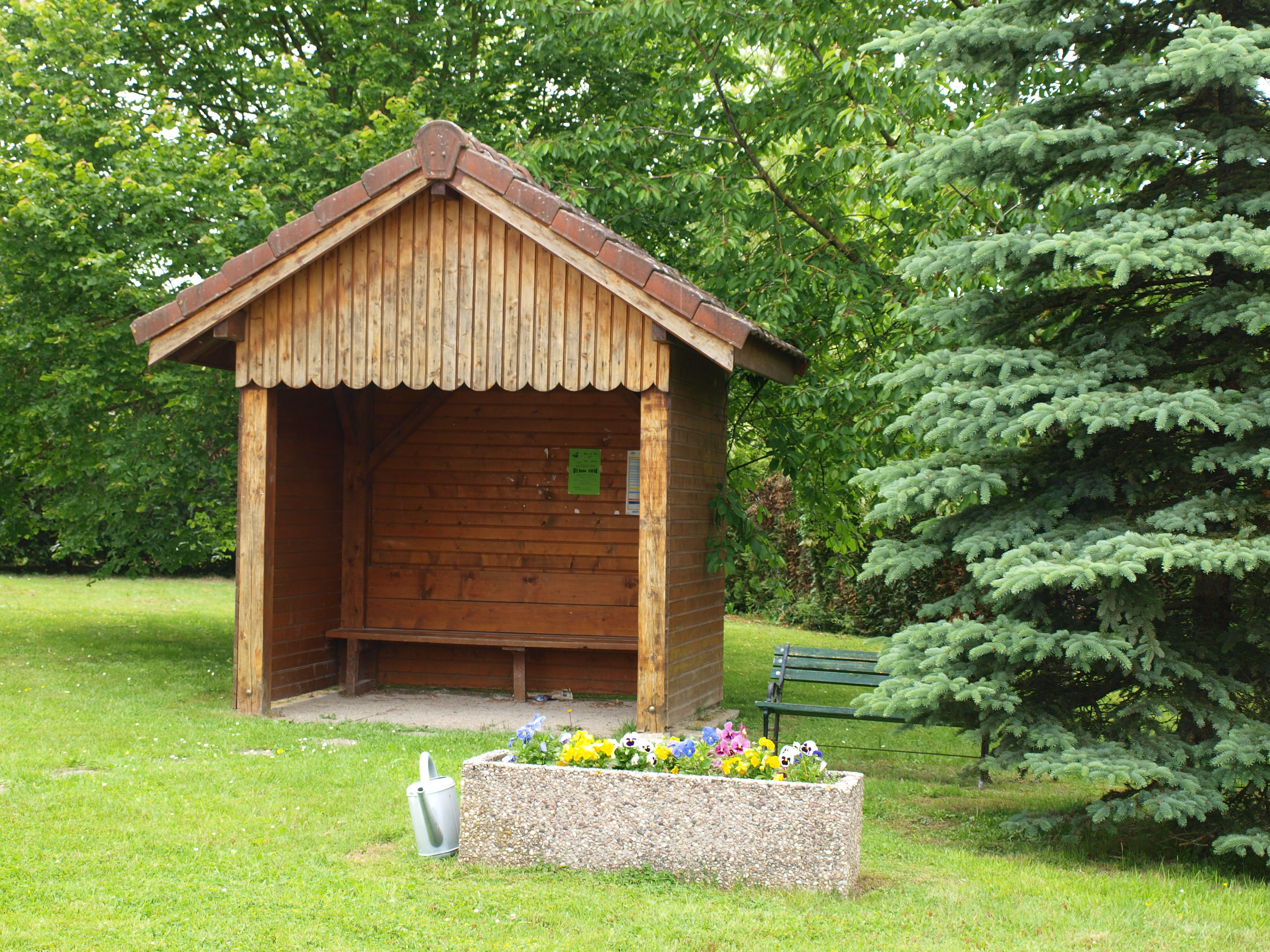 Aure (Ardennes , France) ; abribus